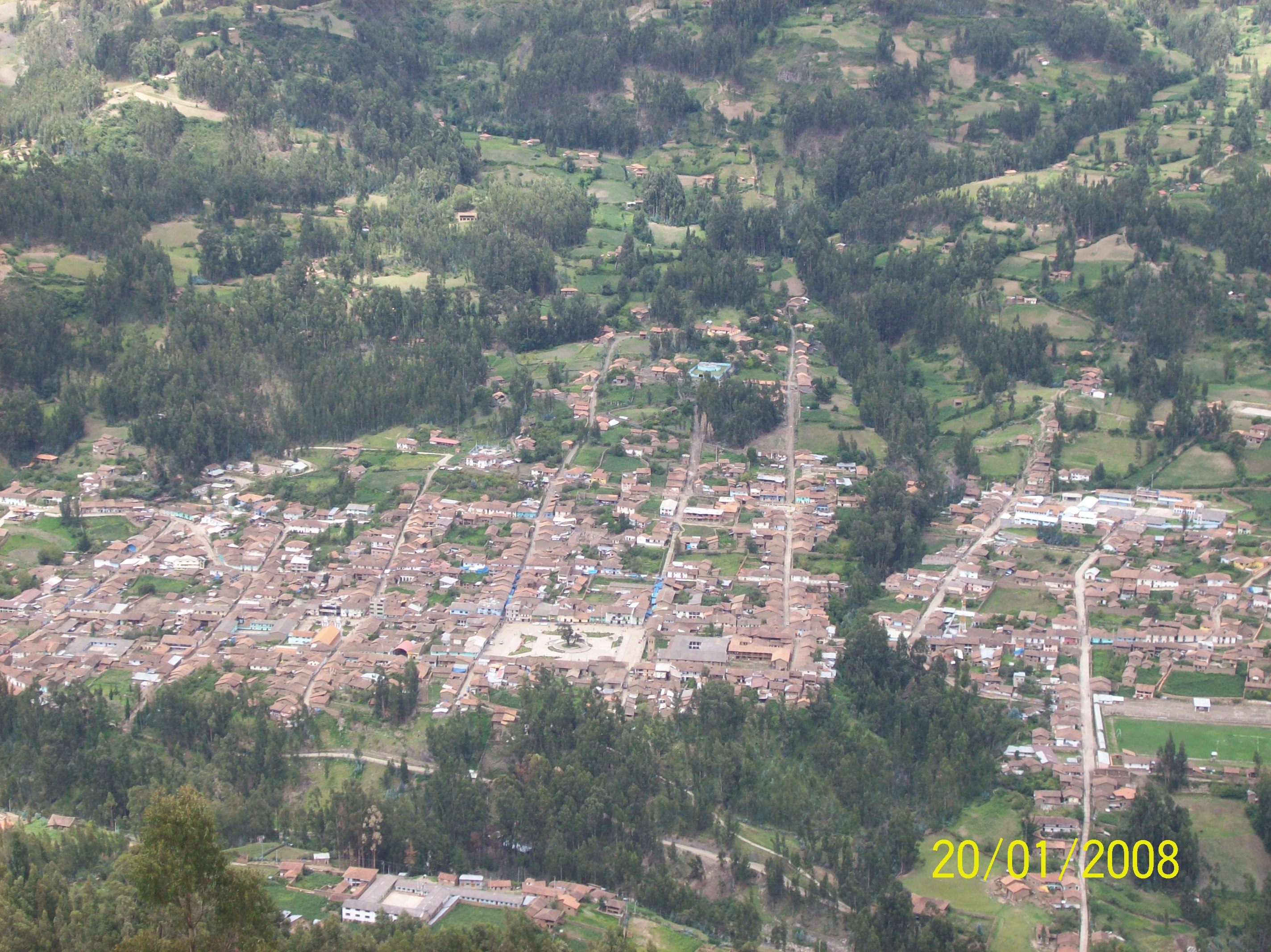 Vista panorámica de la ciudad de Pomabamba